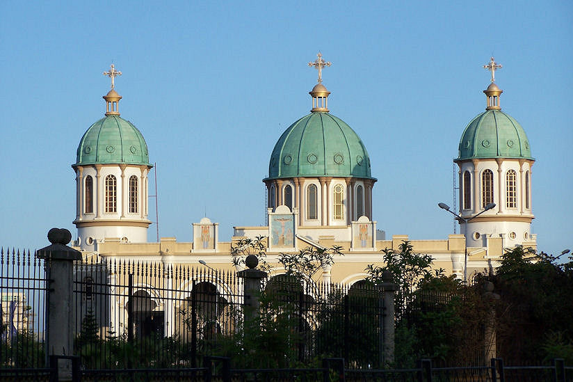 Addis Abeba church